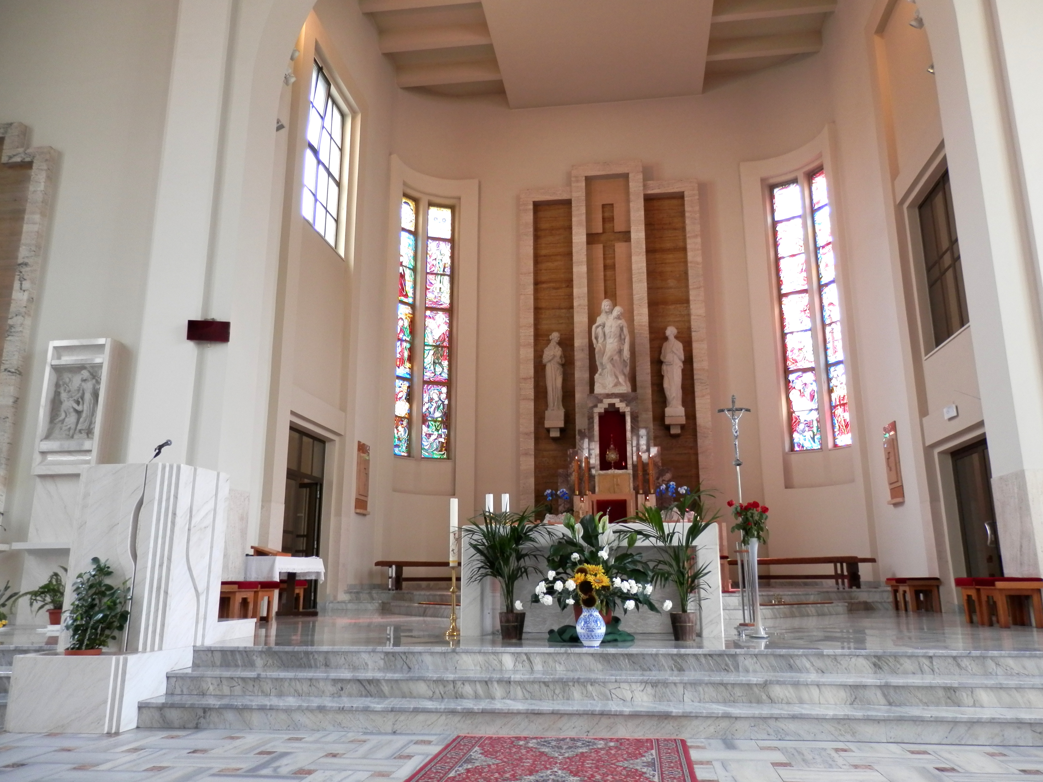 Konkatedrála Sedembolestnej Panny Márie v meste Poprad, región Spiš.Interiér